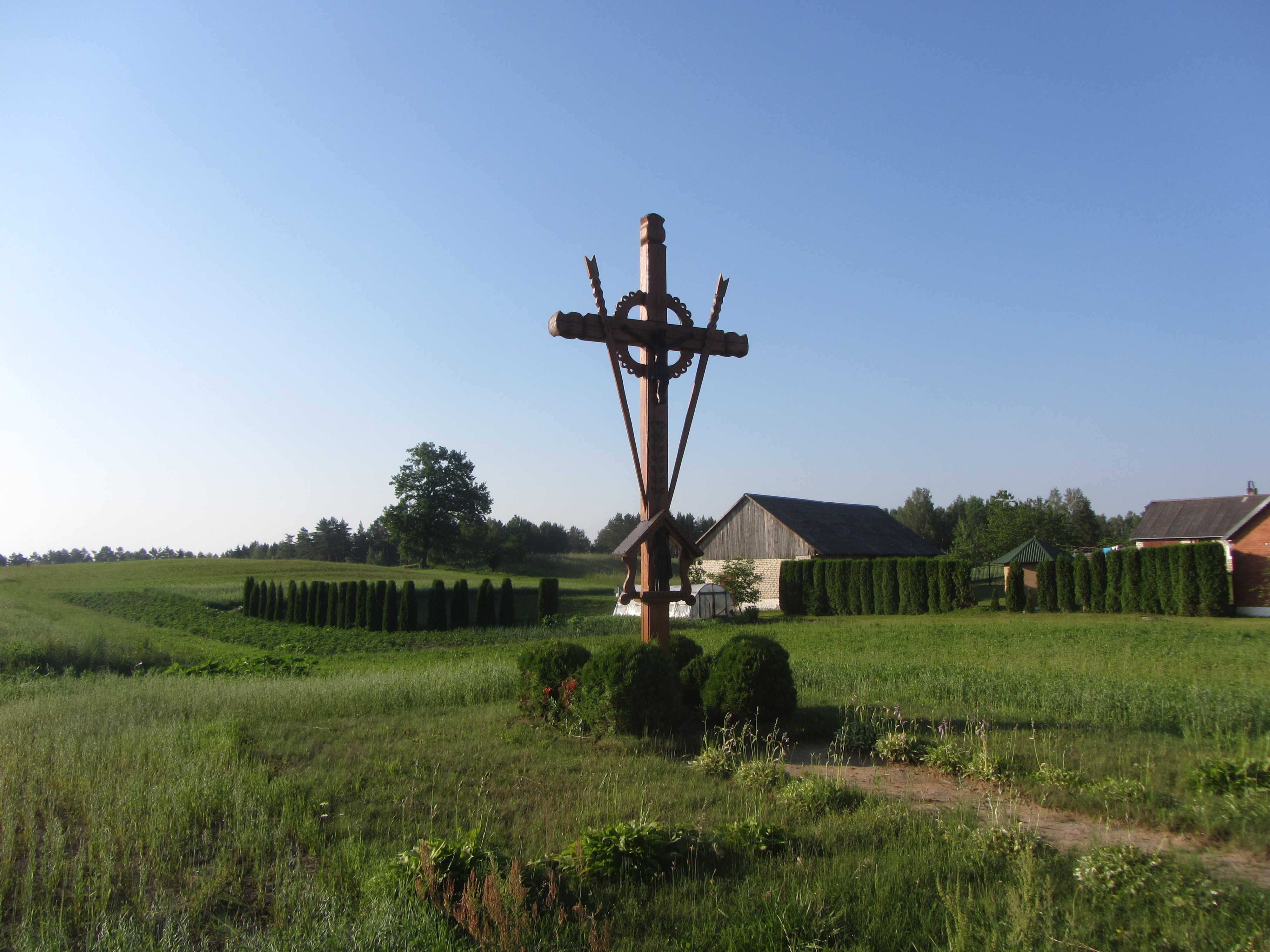 Noragėlių sen., Lithuania